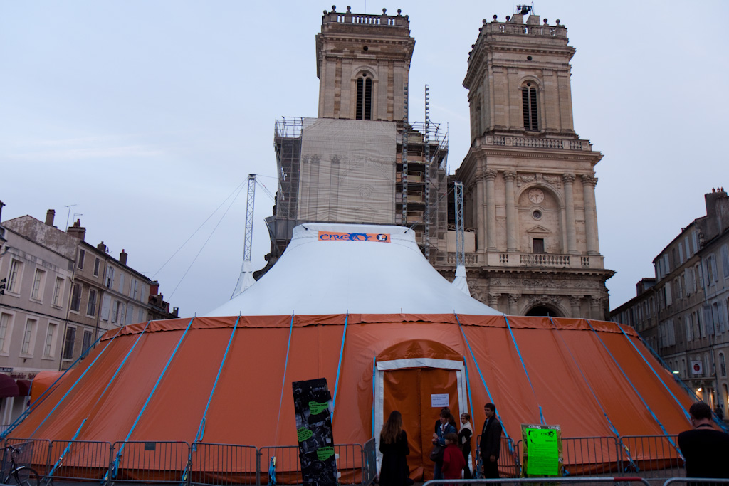 L'un des chapiteau du festival Circa à Auch (Gers, France).